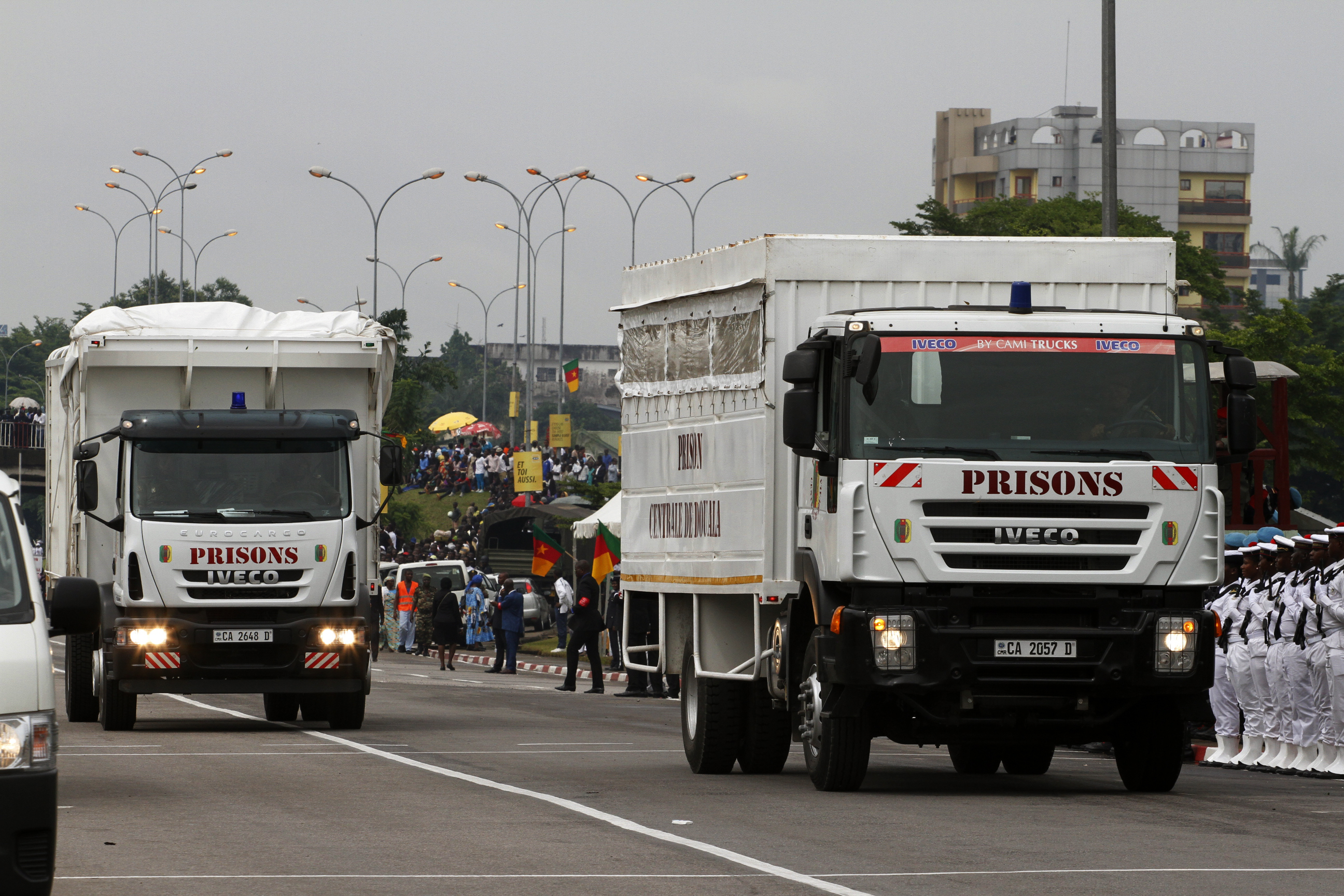 Matériel des gardes prisonniers lors du défilé de la fête nationale du Cameroun le 20 mai 2016 à Douala This is an image with the theme "Africa on the Move or Transport" from: Cameroon